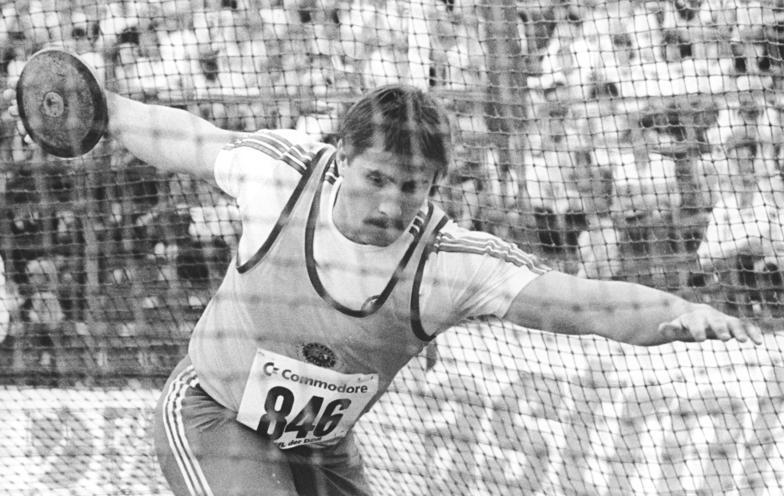 Jürgen Schult ADN-ZB Sindermann 26.6.88 Rostock: 39. DDR-Meisterschaft in der Leichtathletik- Zum sechsten Mal in Folge wurde Weltmeister Jürgen Schult vom SC Traktor Schwerin DDR-Meister im Diskuswerfen der Herren. Seine höchste Tagesweite betrug 66,92 Meter.